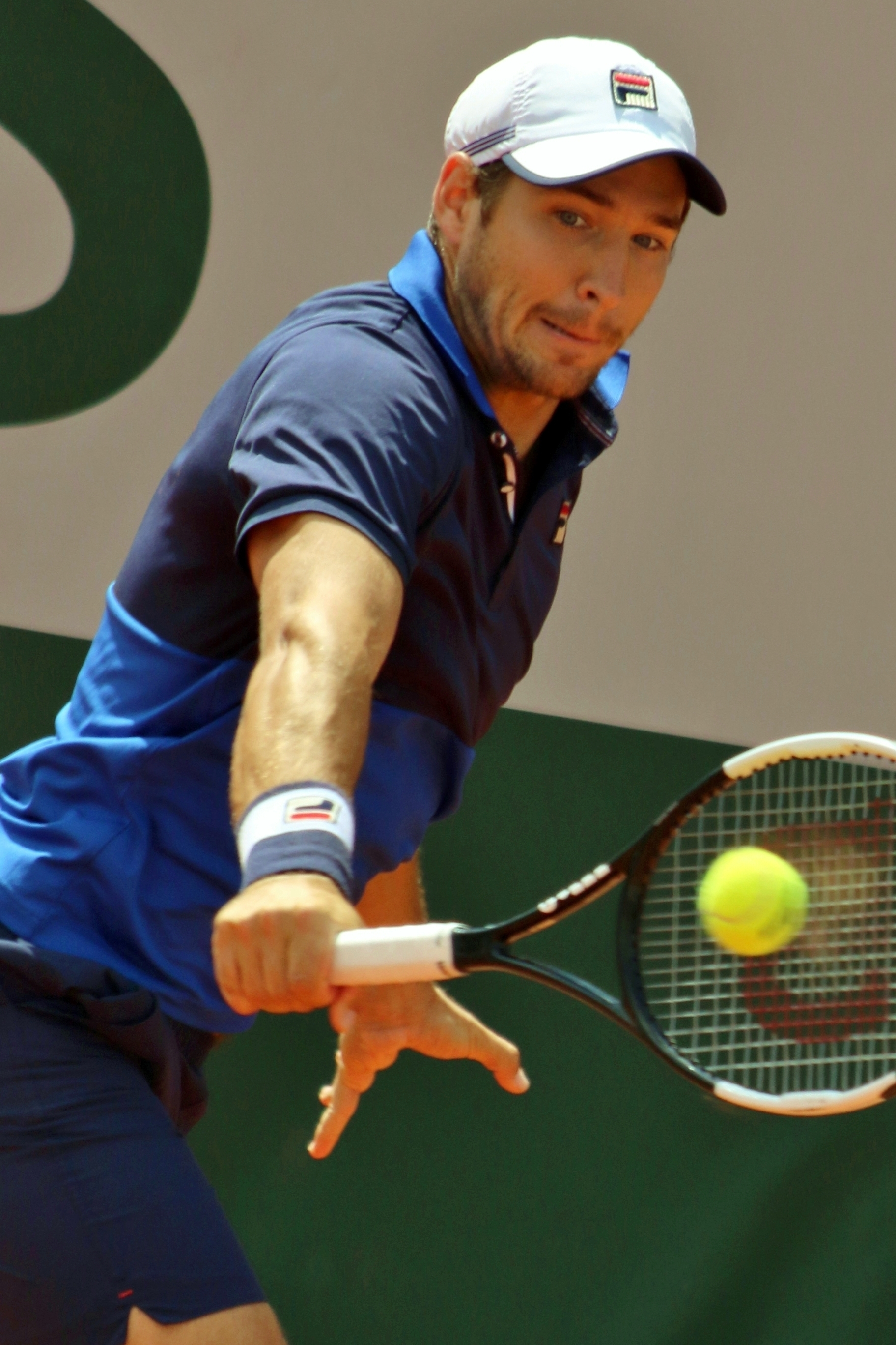 Lajovic RG19 (39)